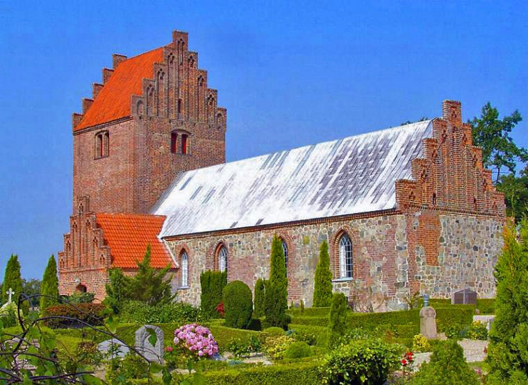 fra sydøst